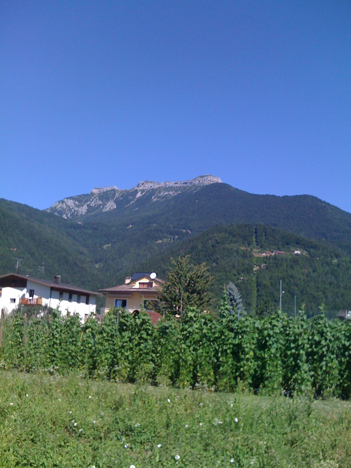 Monte Coppolo Lamon (BL) Italia